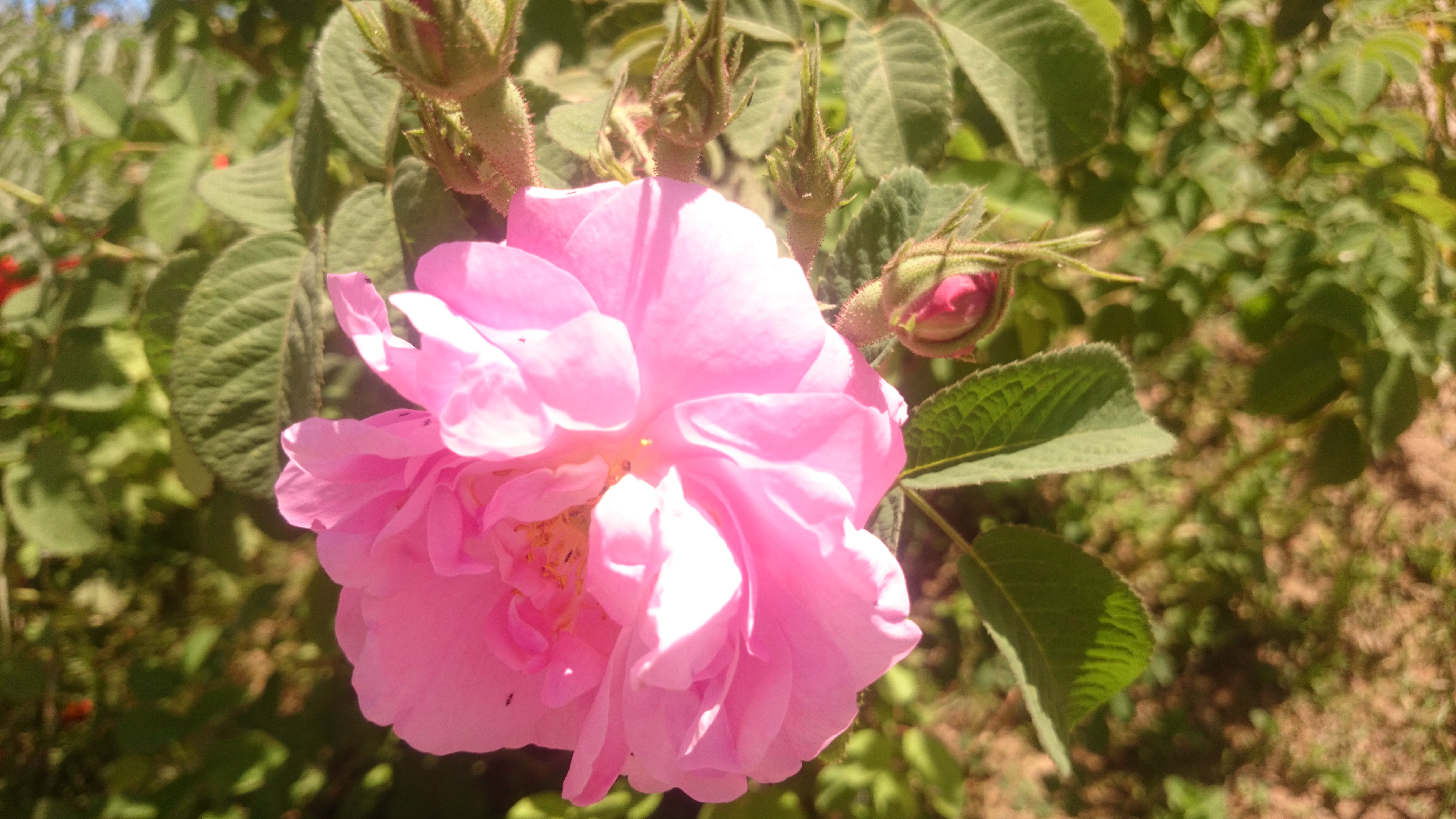 زهرة بحديقة منزلي